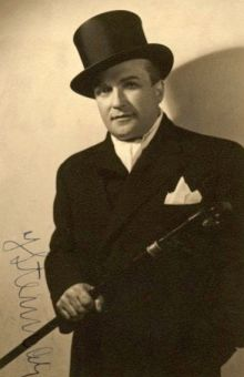 Miloš Steimar (1922-1949), český divadelní a filmový herec